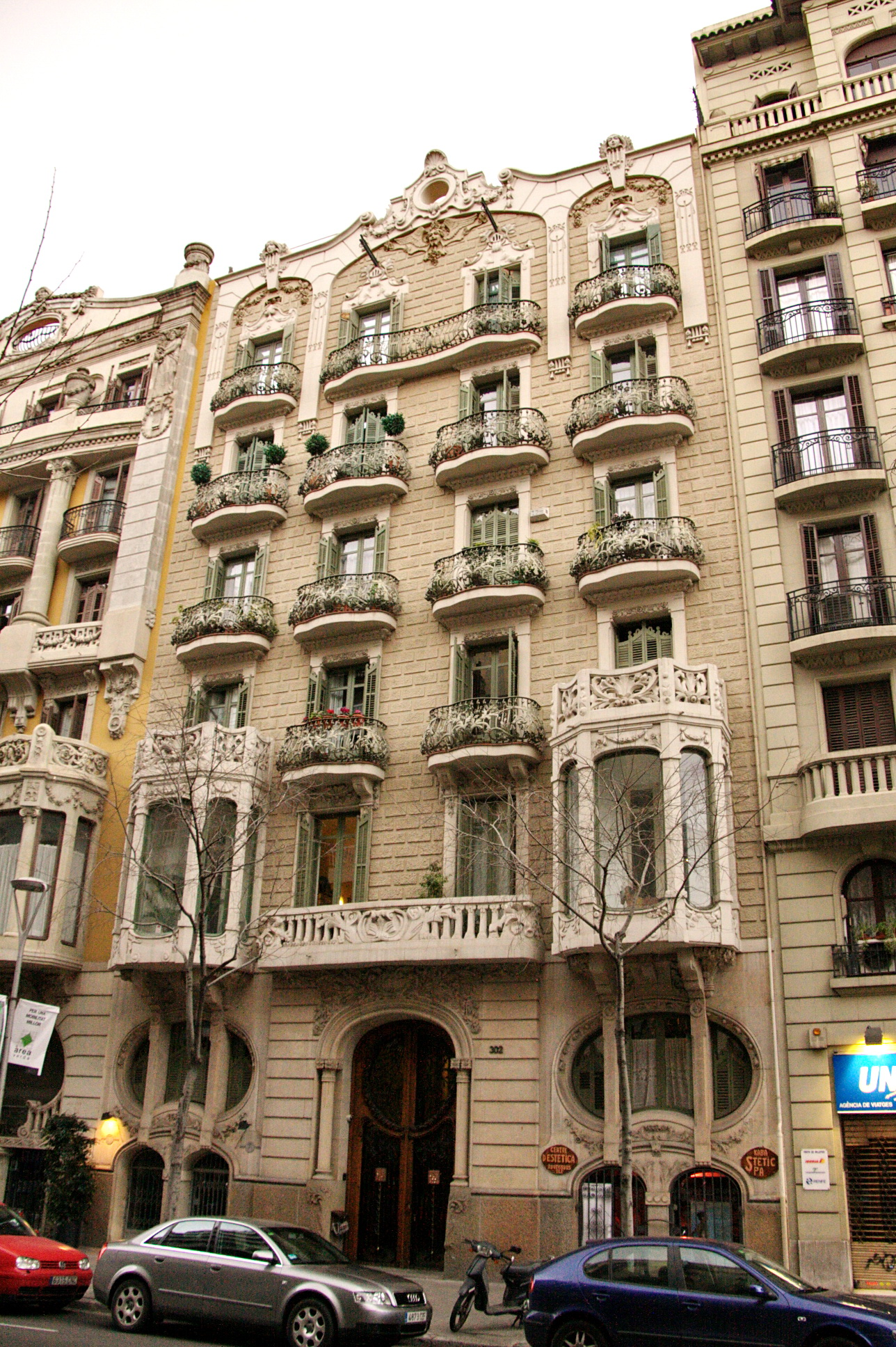 Casa Vallet de Barenys Gambus (Barcelona)